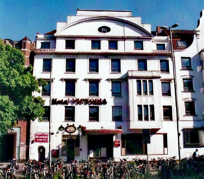 Architekten-Firma Schöss & Redelstorff, Baumeister Rudolf Wegner. 1918 hatte das Gebäude noch die Anschriften Am Bahnhof Nr. 17 und 19. In der 17 Befand sich das Hotel International in der 19 das Hotel Viktoria. Im Hotel International internierte der Lübecker Arbeiter- und Soldatenrat die in der Stadt befindlichen Offiziere.